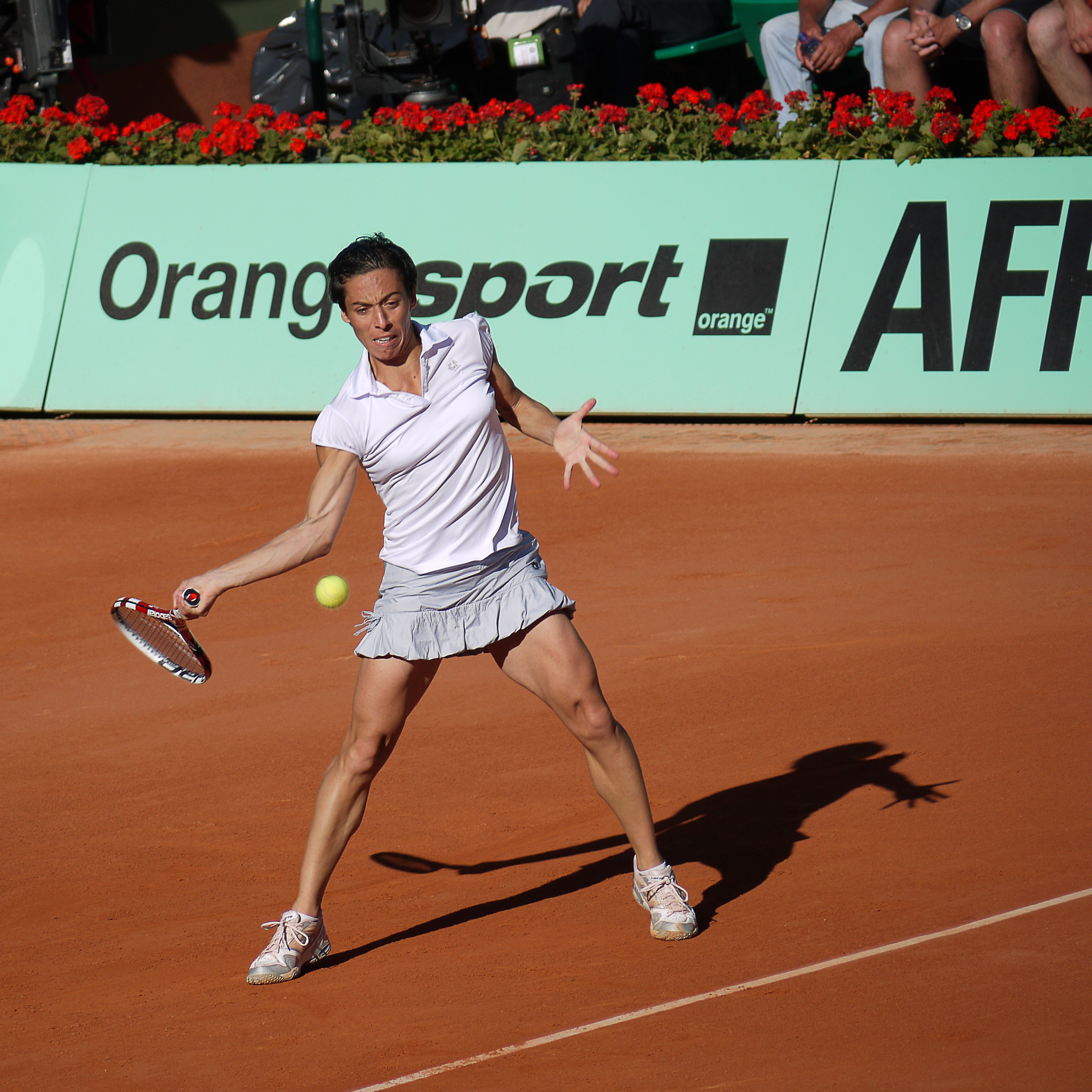 Francesca Schiavone (ITA) def. Vesna Dolonts (RUS) Roland Garros 2011 - mercredi 25 mai - 2ème tour - Court Philippe Chatrier